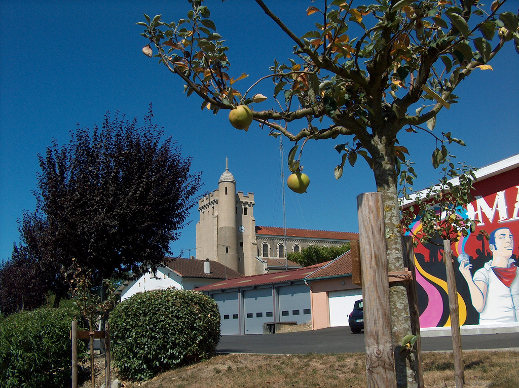 Pomarez; caserne des pompiers, tour et église.